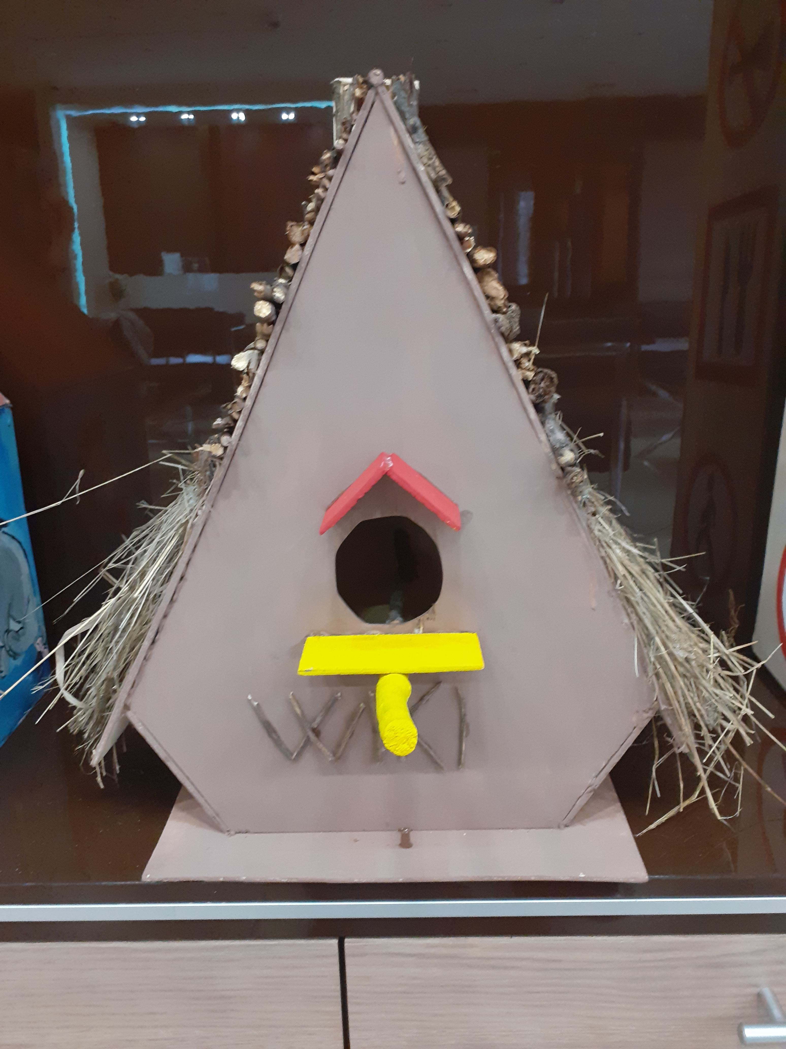 Թռչնաբույն (Վիքիճամբար, 4-րդ ջոկատ)